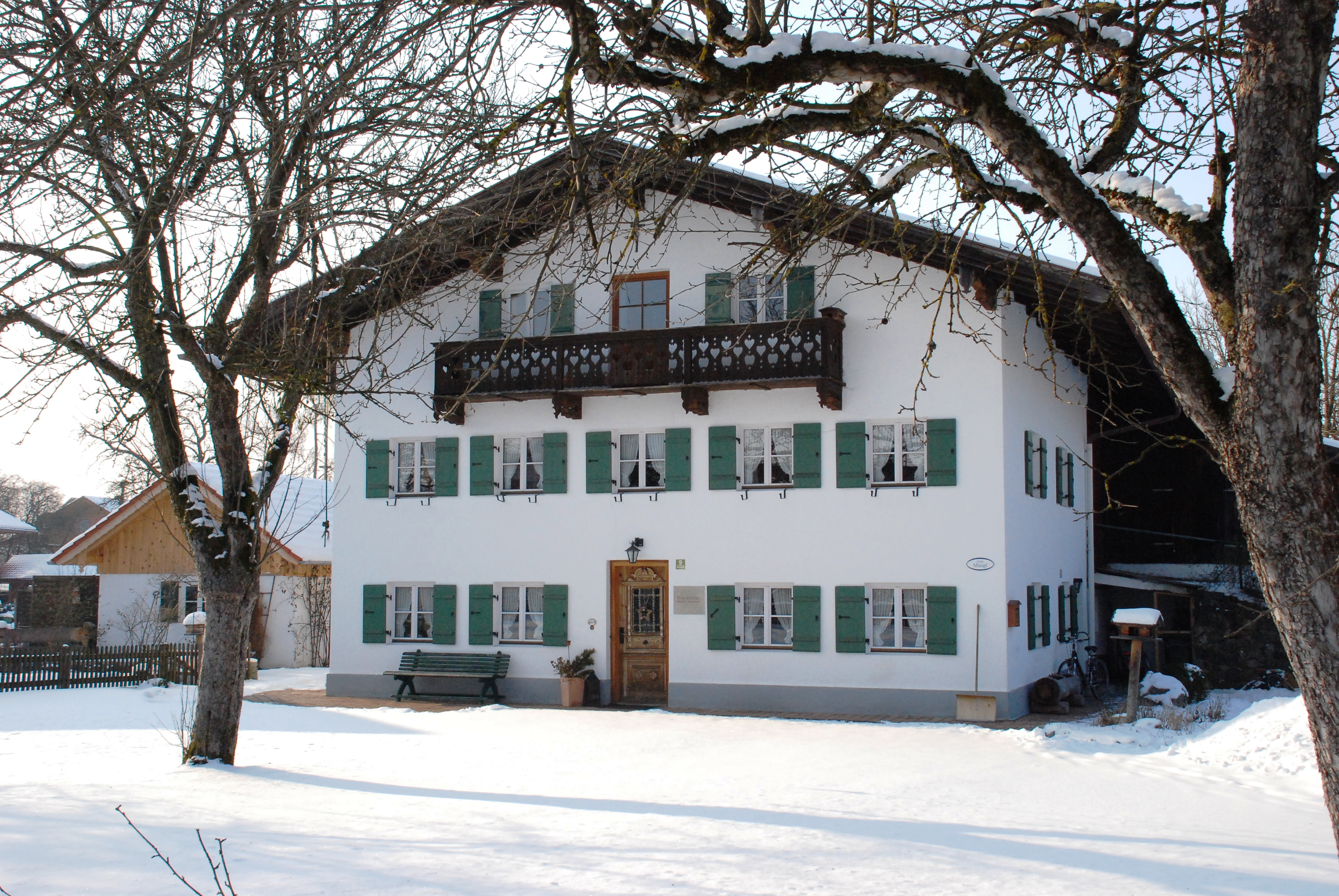 Bauernhaus Manglhof in der Bahnhofstraße 9 in Bichl, Landkreis Bad Tölz-Wolfratshausen, Regierungsbezirk Oberbayern, Bayern. Als Baudenkmal unter Aktennummer D-1-73-115-4 in der Bayerischen Denkmalliste aufgeführt.